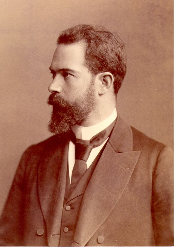 Max Rothmann